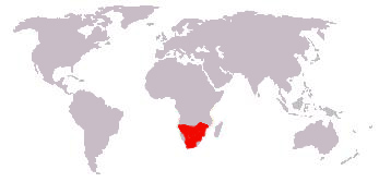 מפת תפוצה של אורג מסכה אפריקני Leefgebied Ploceus velatus